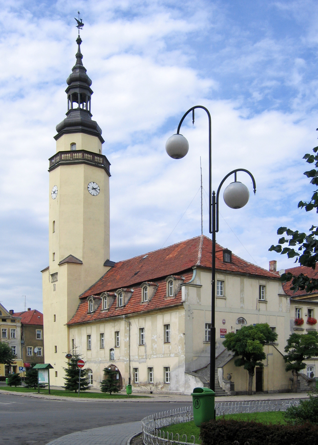 Mirsk, pl. Wolności 39 - ratusz, XVIII